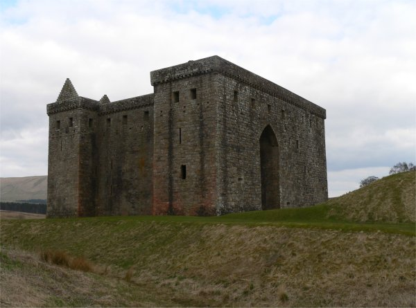 Hermitage Castle, Scotland